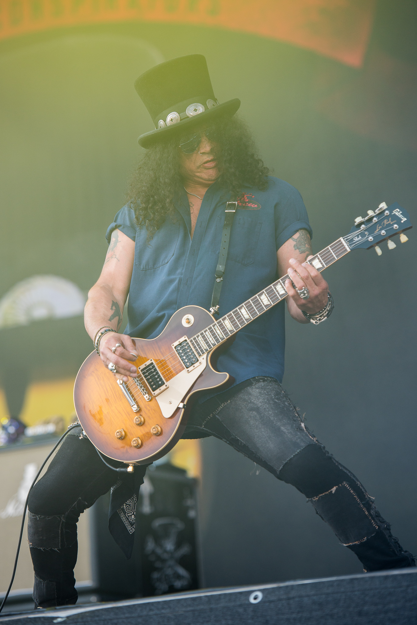 ARGO-Konzerte,Festival,Konzert,Livekonzert,Livemusik,Musik,RiP,Rock im Park 2015,Saul Hudson,Seat Zeppelin Stage,Slash feat. Myles Kennedy & The Conspirators